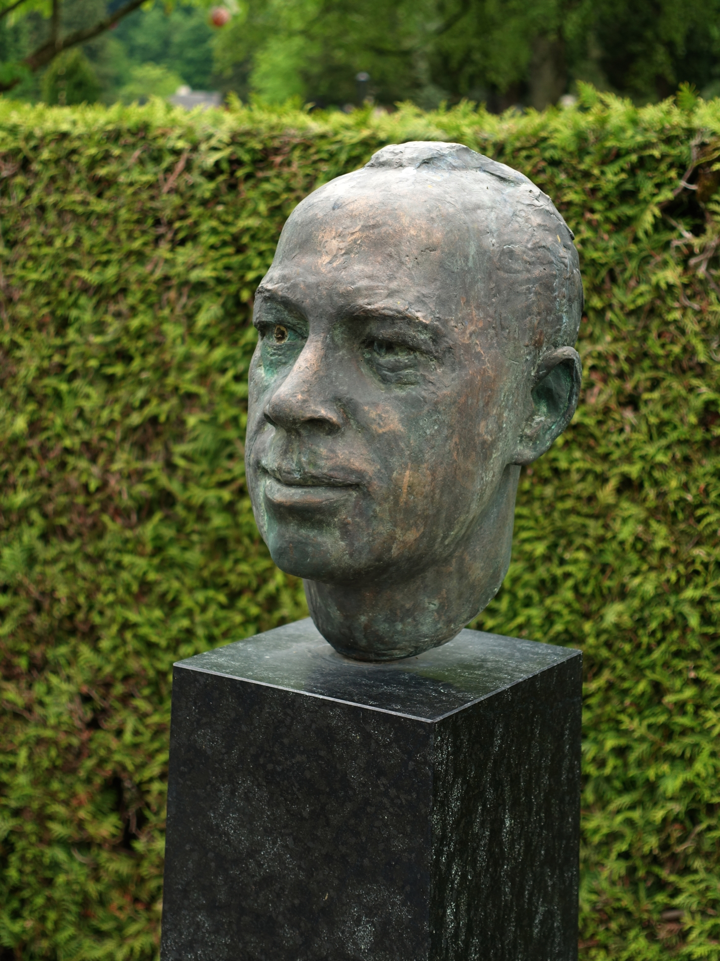 Hans Rudolf Meyer (1922–2005) Rechtsanwalt, Nationalrat, Stadtpräsident von Luzern. Bronze Büste, Grab auf dem Friedhof Friedental, Feld 10, Stadt Luzern